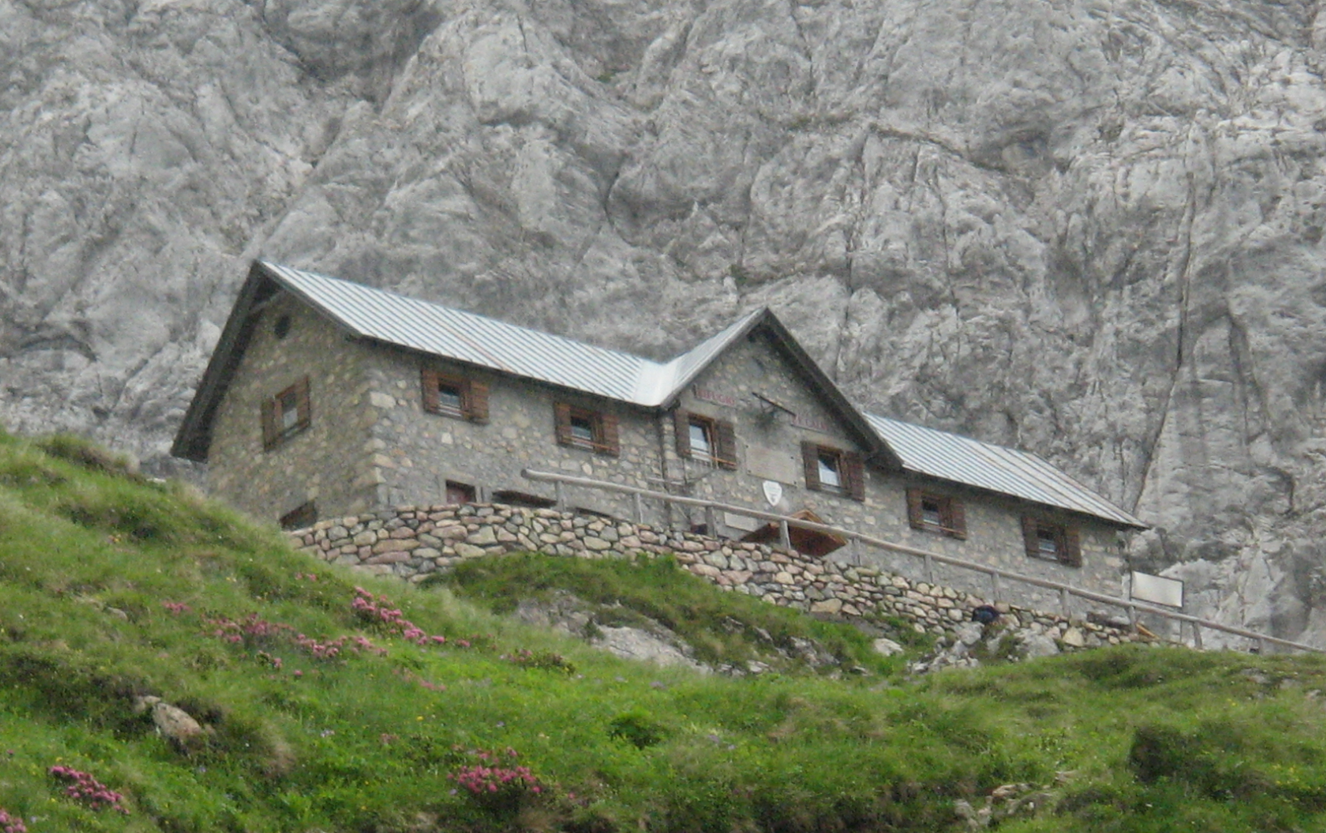 Io, Alpino friulano dichiaro di aver scattato questa foto e di essere il detentore del copyright che dono a wikipedia